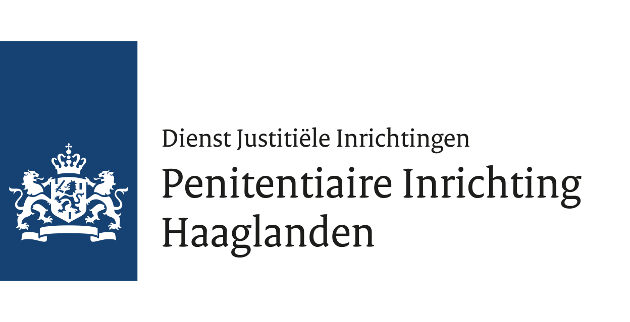 Penitentiaire Inrichting Haaglanden, Dienst Justitiële Inrichtingen